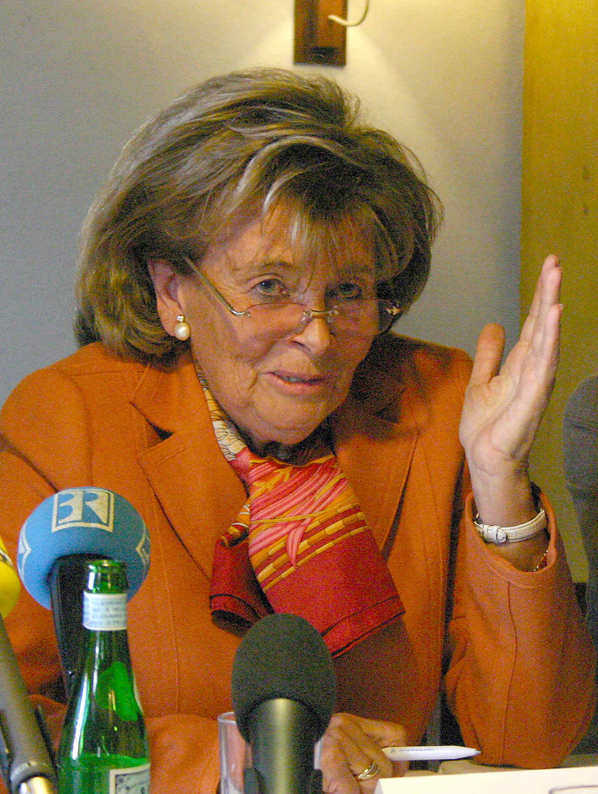 Charlotte Knobloch, u.a. Präsidentin der Israelitischen Kultusgemeinde München und Oberbayern. Titel des Werks: "Charlotte Knobloch (2005)"